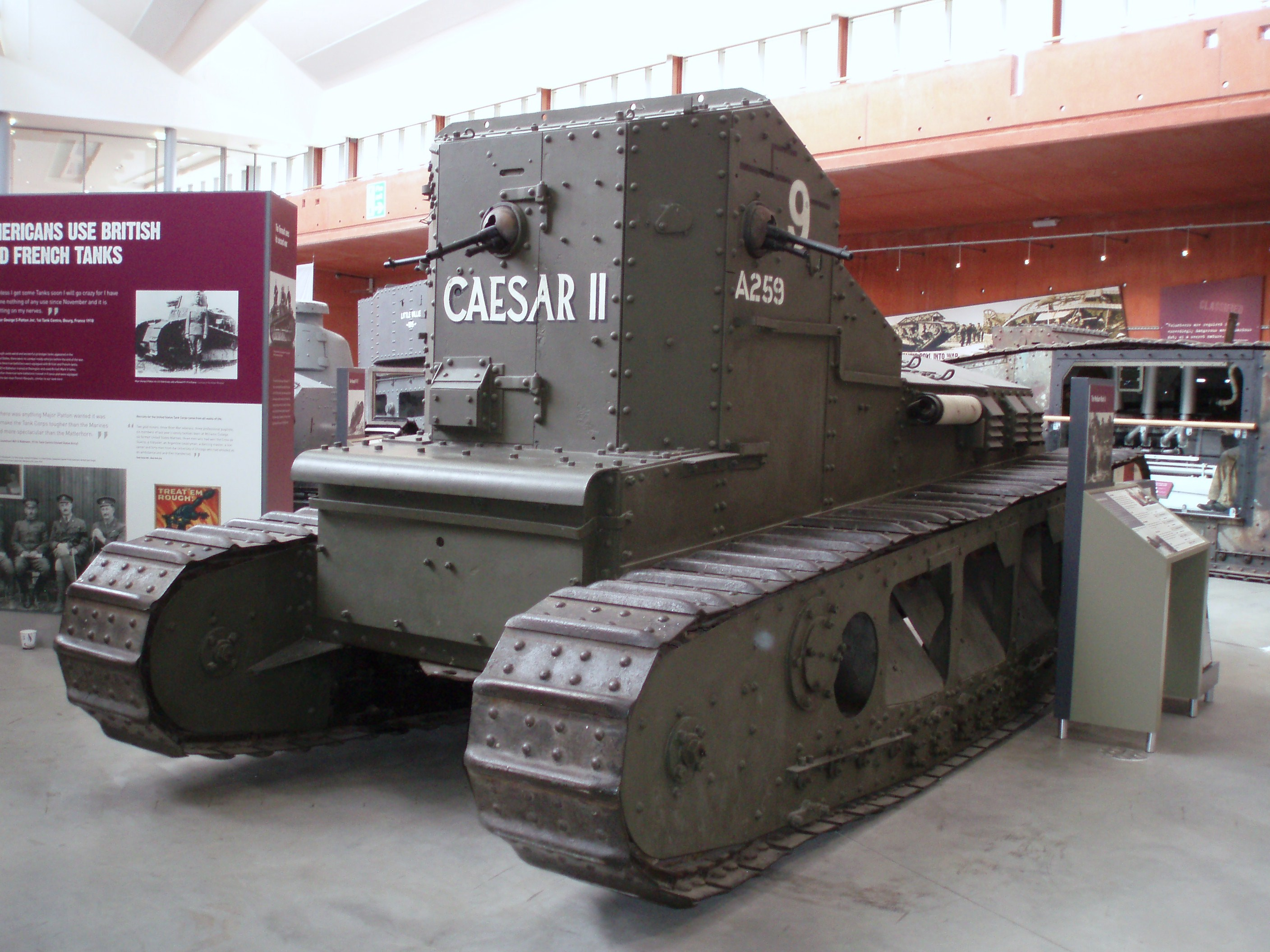 Bovington Tank Museum 032 medium mark A